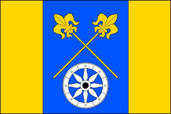 Vlajka obce Milíkov (okres Frýdek-Místek)